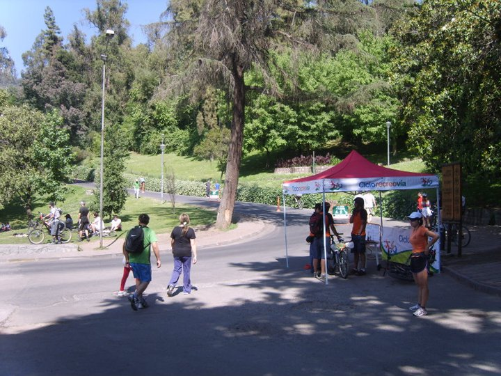 CicloRecreoVía San Cristobal